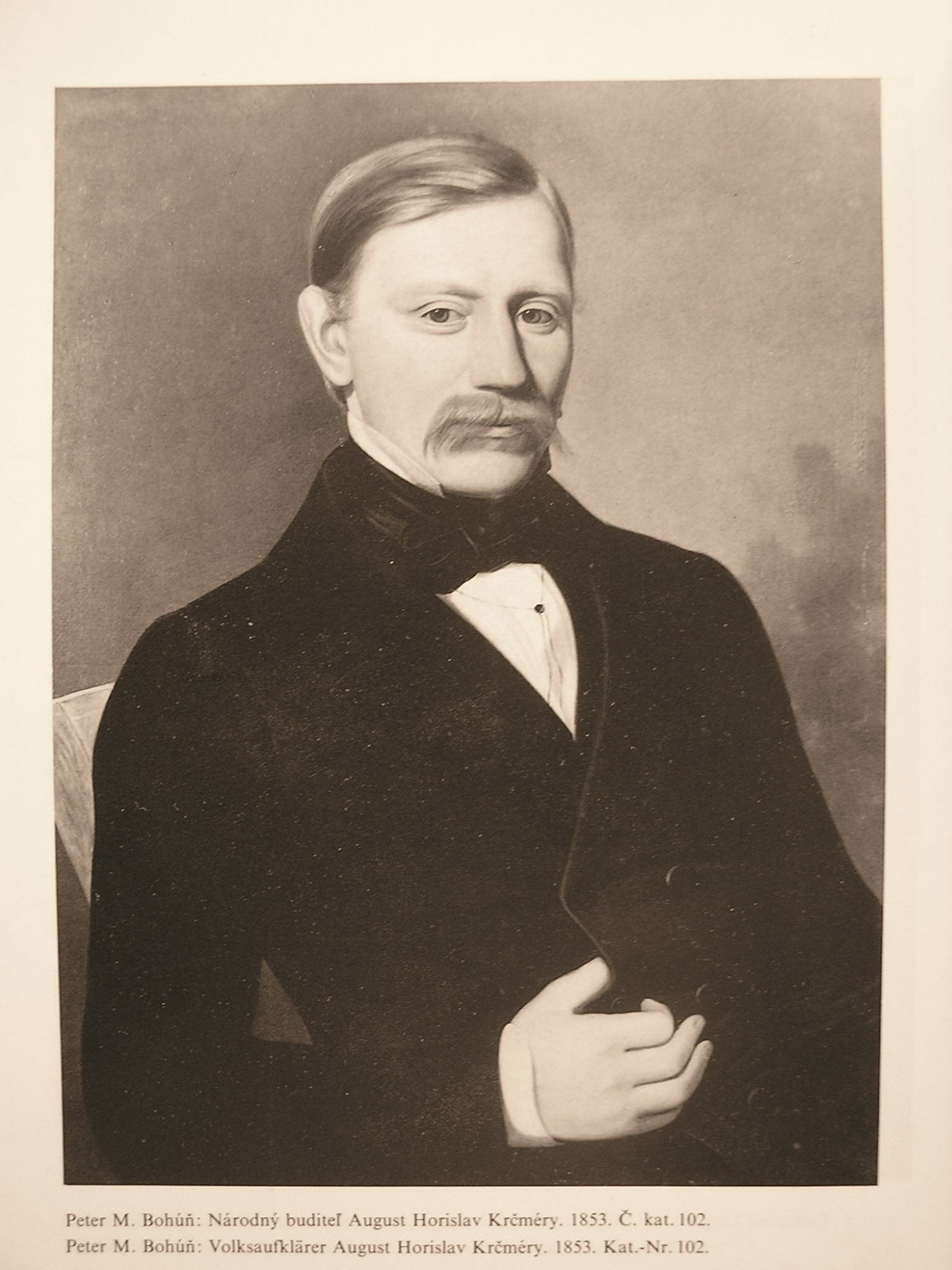 Podobizeň Augusta Horislava Krčméryho